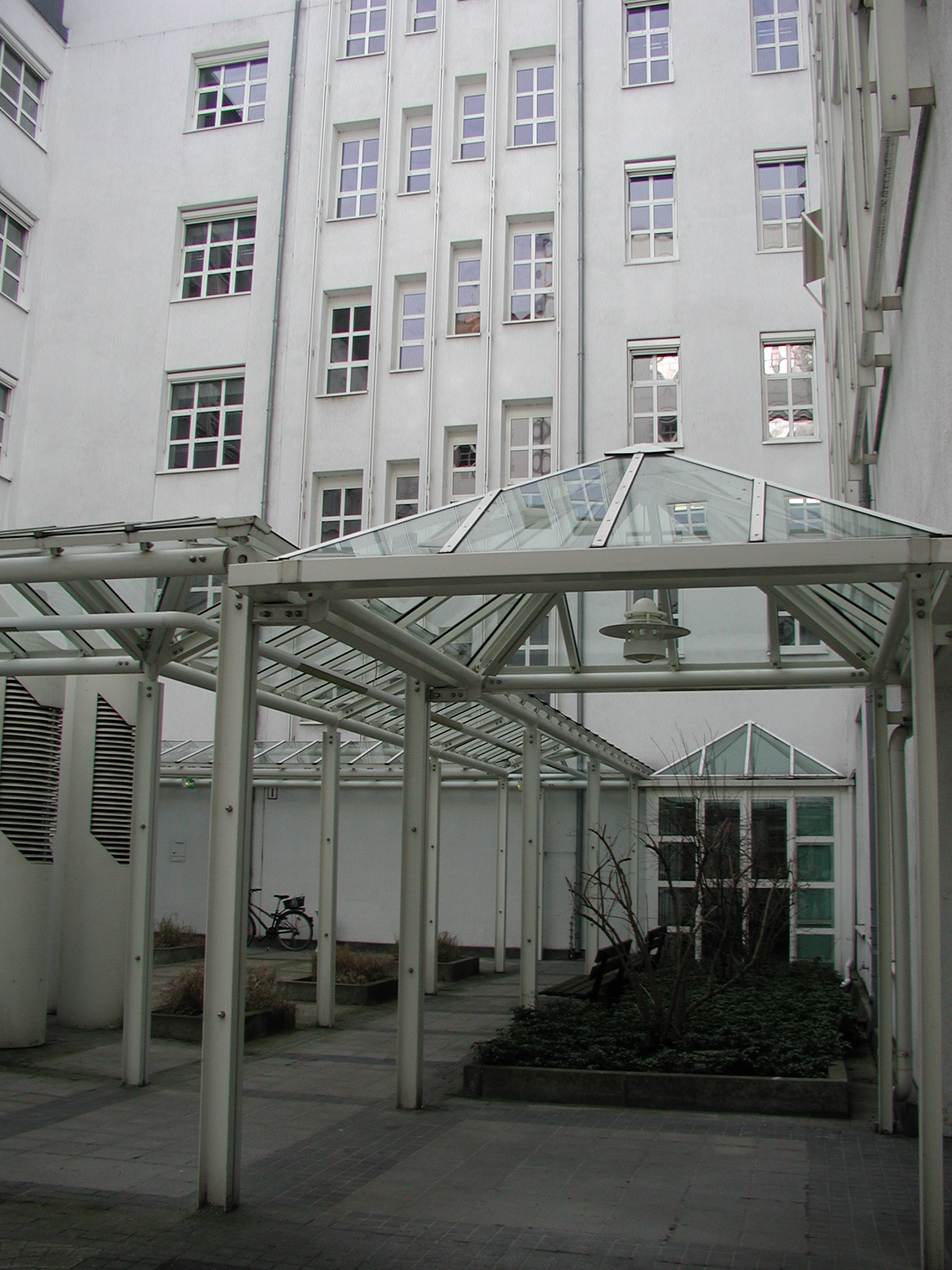 Ein Lichthof des Schicklerhauses in Berlin